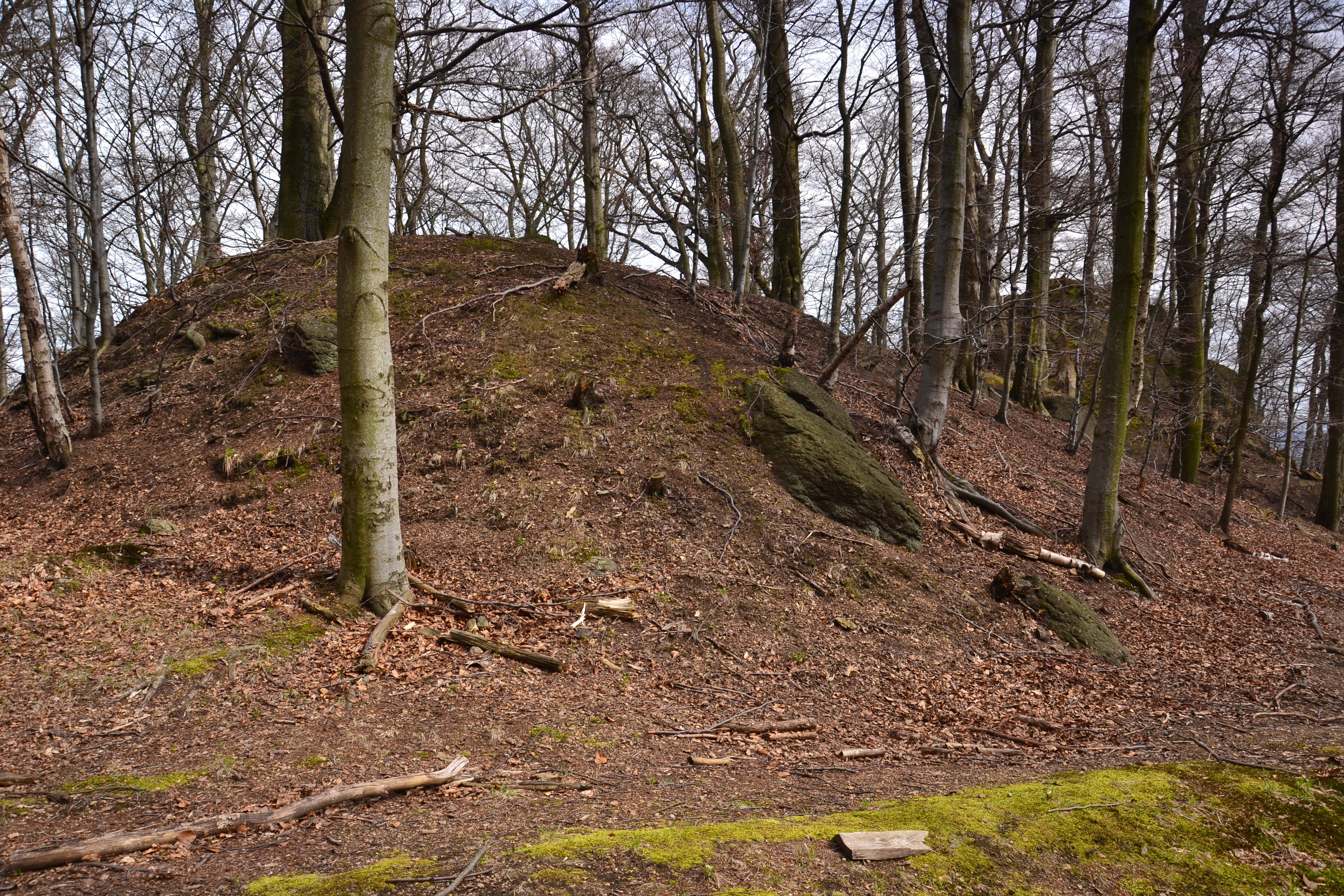 Celkový pohled na hrad